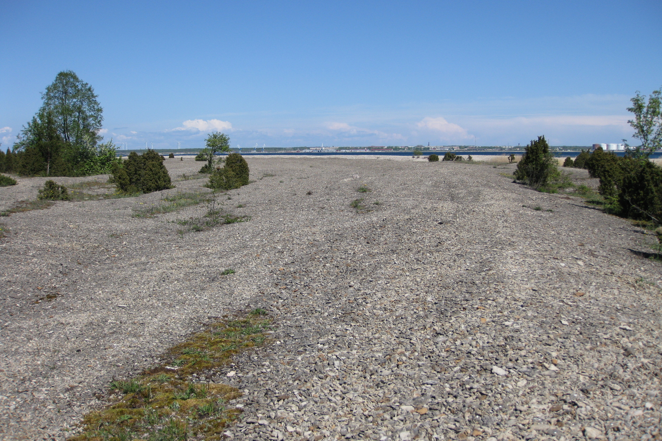 Väike-Pakri kagurand, Pakri MKA